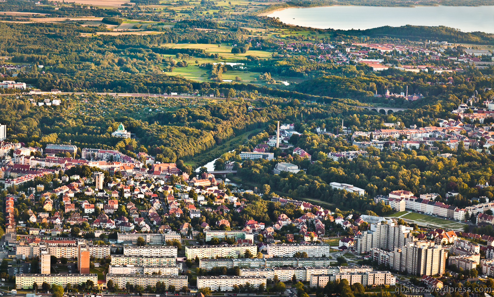 Zgorzelec z lotu ptaka, a w tle Berzdorfer See